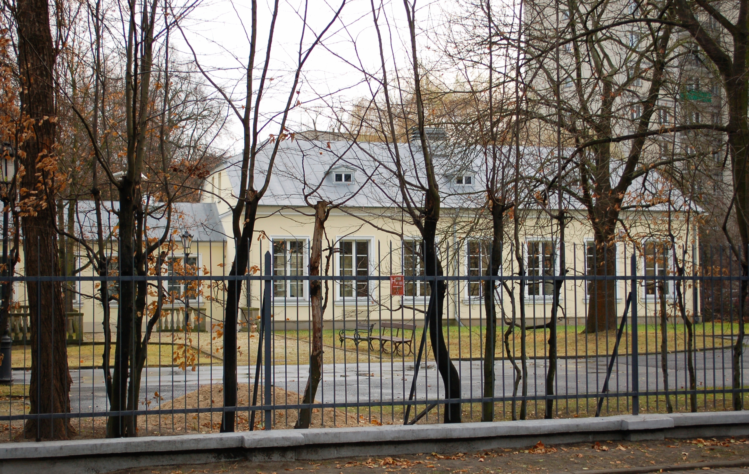 Ksawerów palace, Warsaw